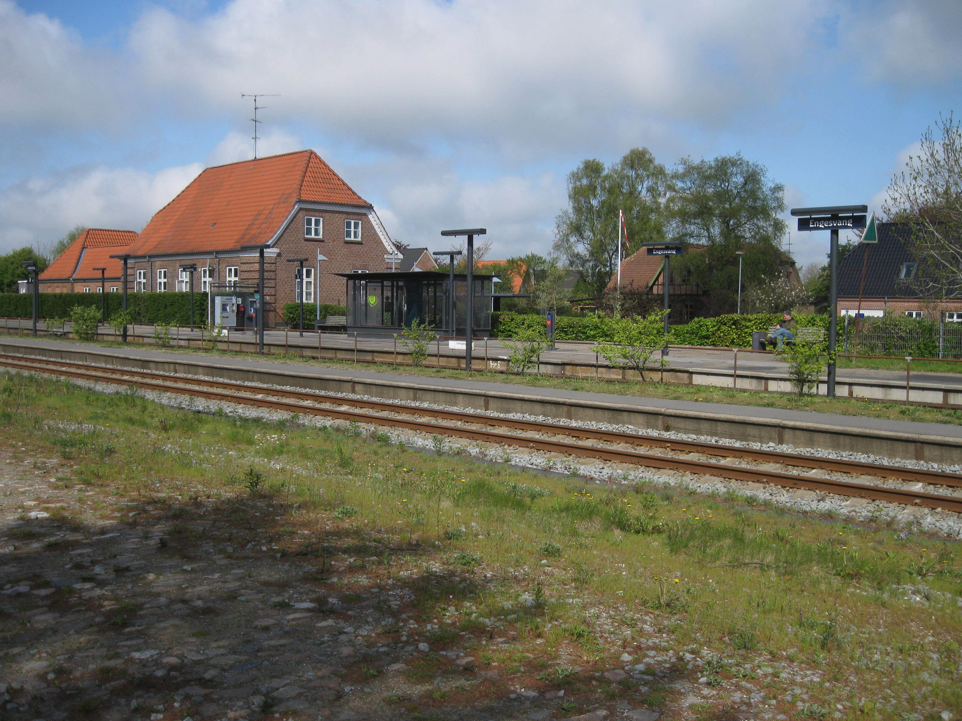 Engesvang Station